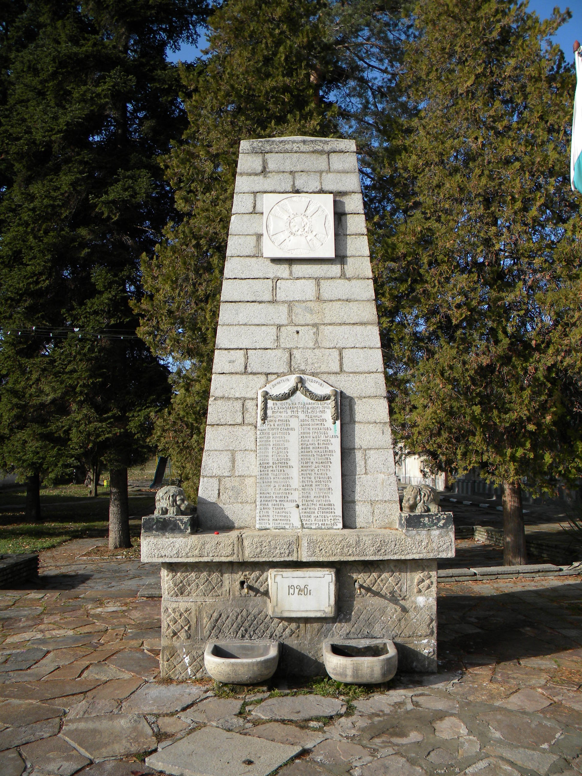 Паметникът на загиналите във войните в Зелениково